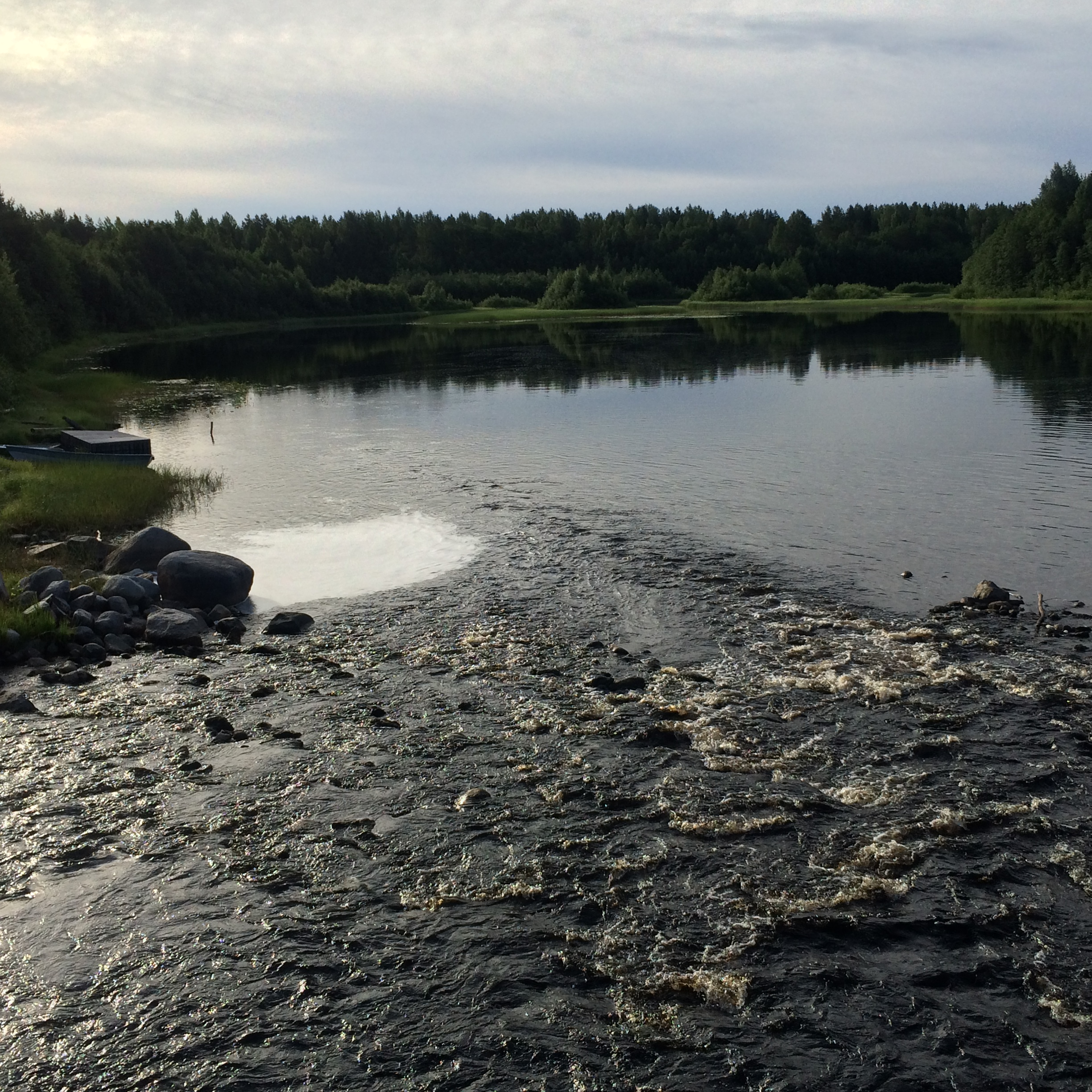 Айттойоки